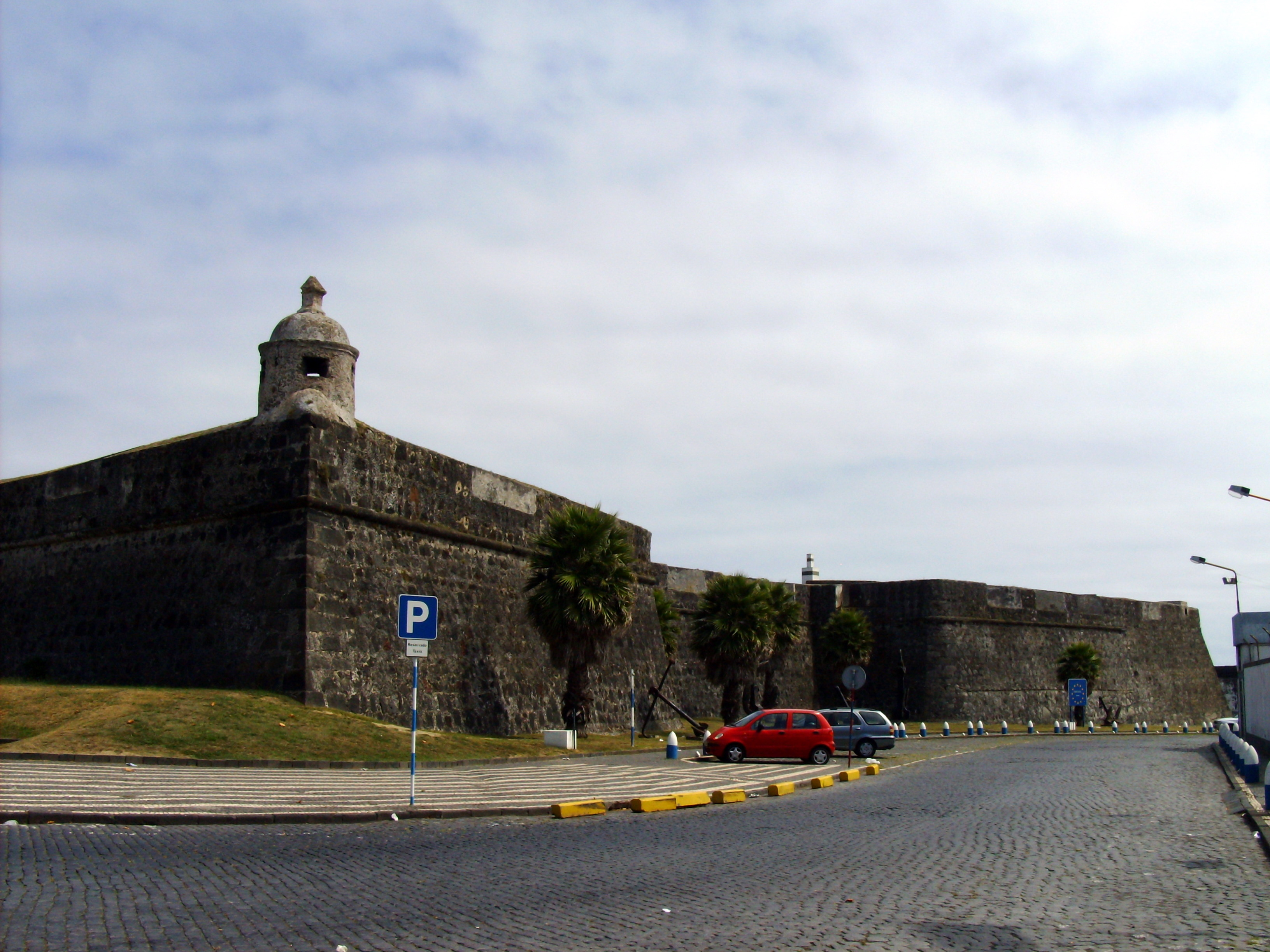 Forte de São Brás, Ponta Delgada, Ilha de São Miguel, Portugal: vista dos baluartes.